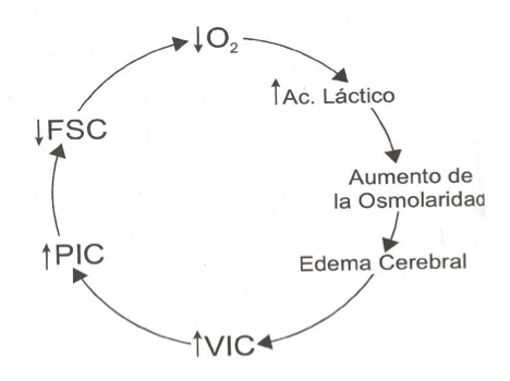 Ciclo FSC